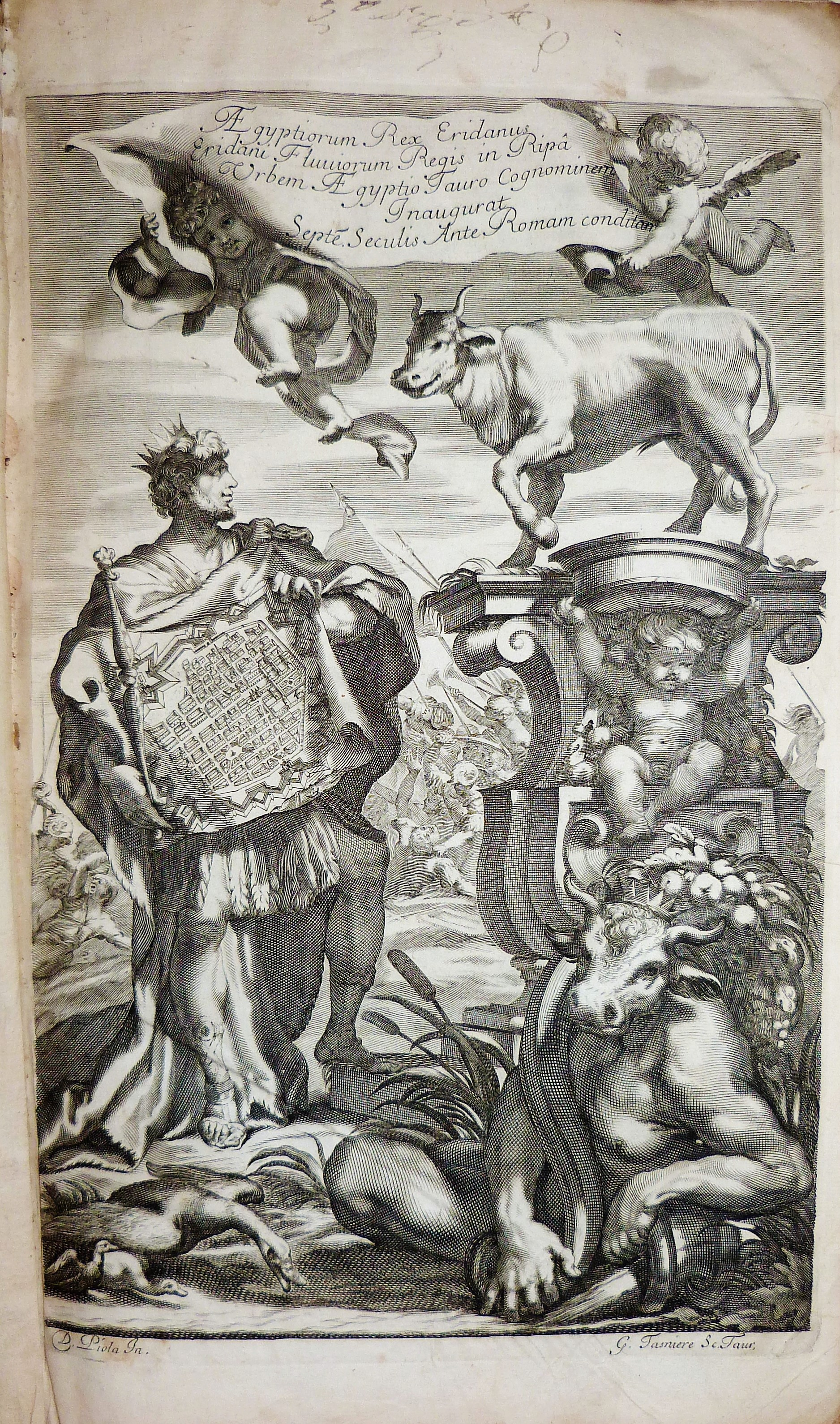 Edizione originale di importante e dettagliato trattato storico dell’antica città di Torino, iniziato da Emanuele Tesauro e dal Giroldi e completato, trent’anni dopo, da Francesco Maria di Lavriano.